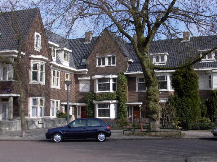 Foto gemaakt door Daniel van der Ree